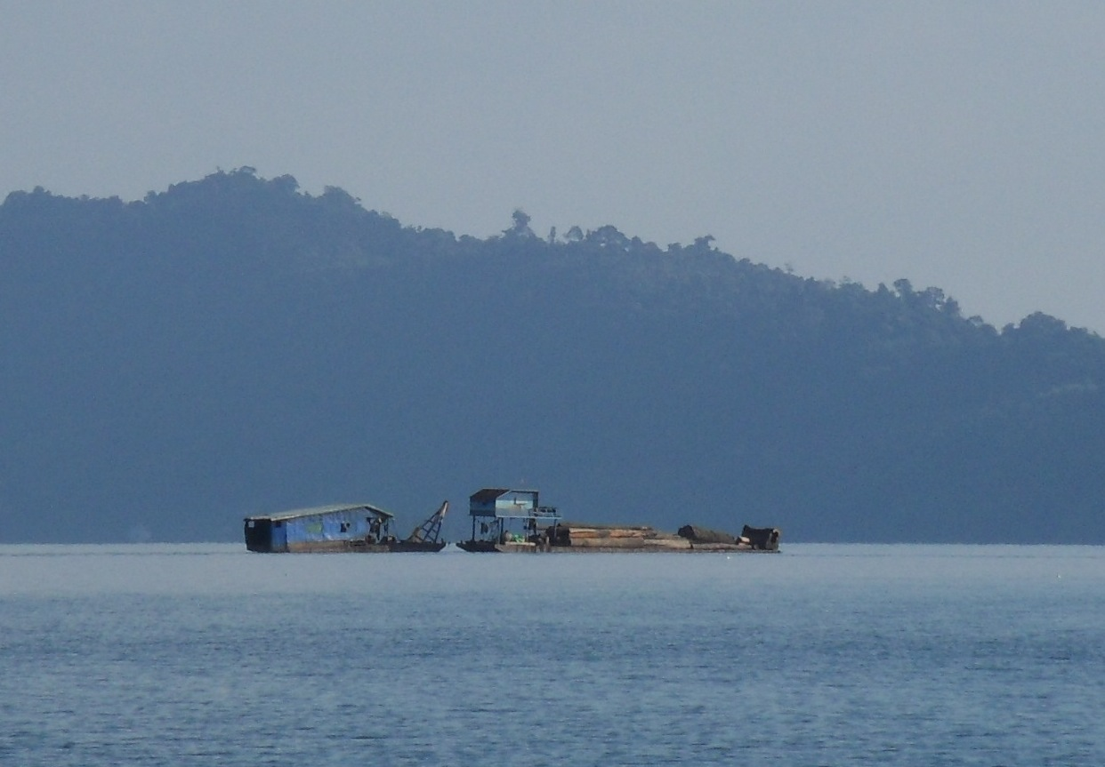 Bateau d'exploitation forestière (tecks submergés) sur la Lac de la Nam Ngum.